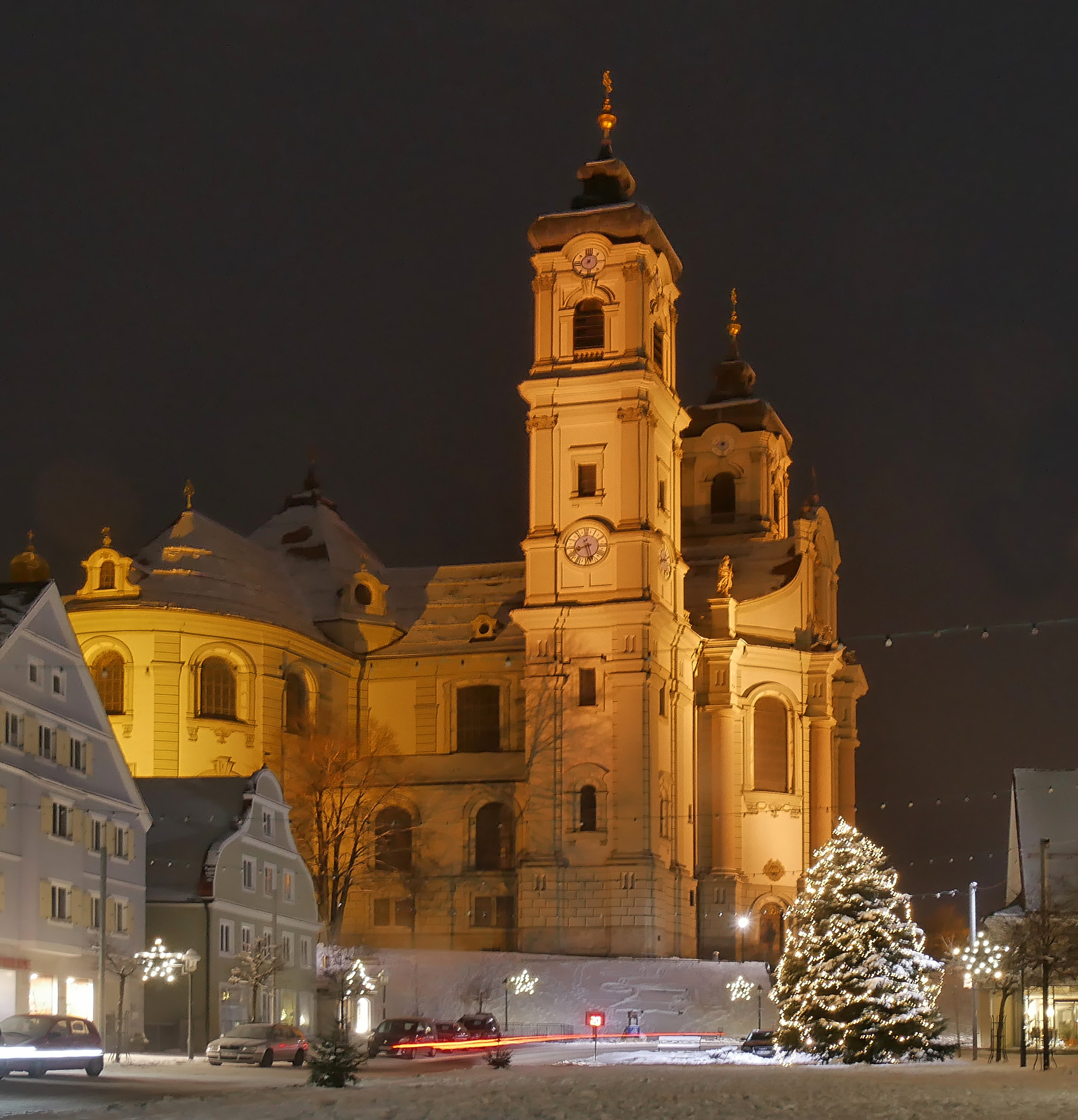 Basilika Ottobeuren vom Ottobeurer Marktplatz aus gesehen